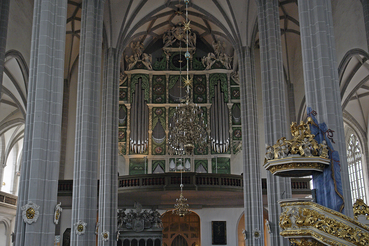 Görlitz, Peterskirche, Orgel